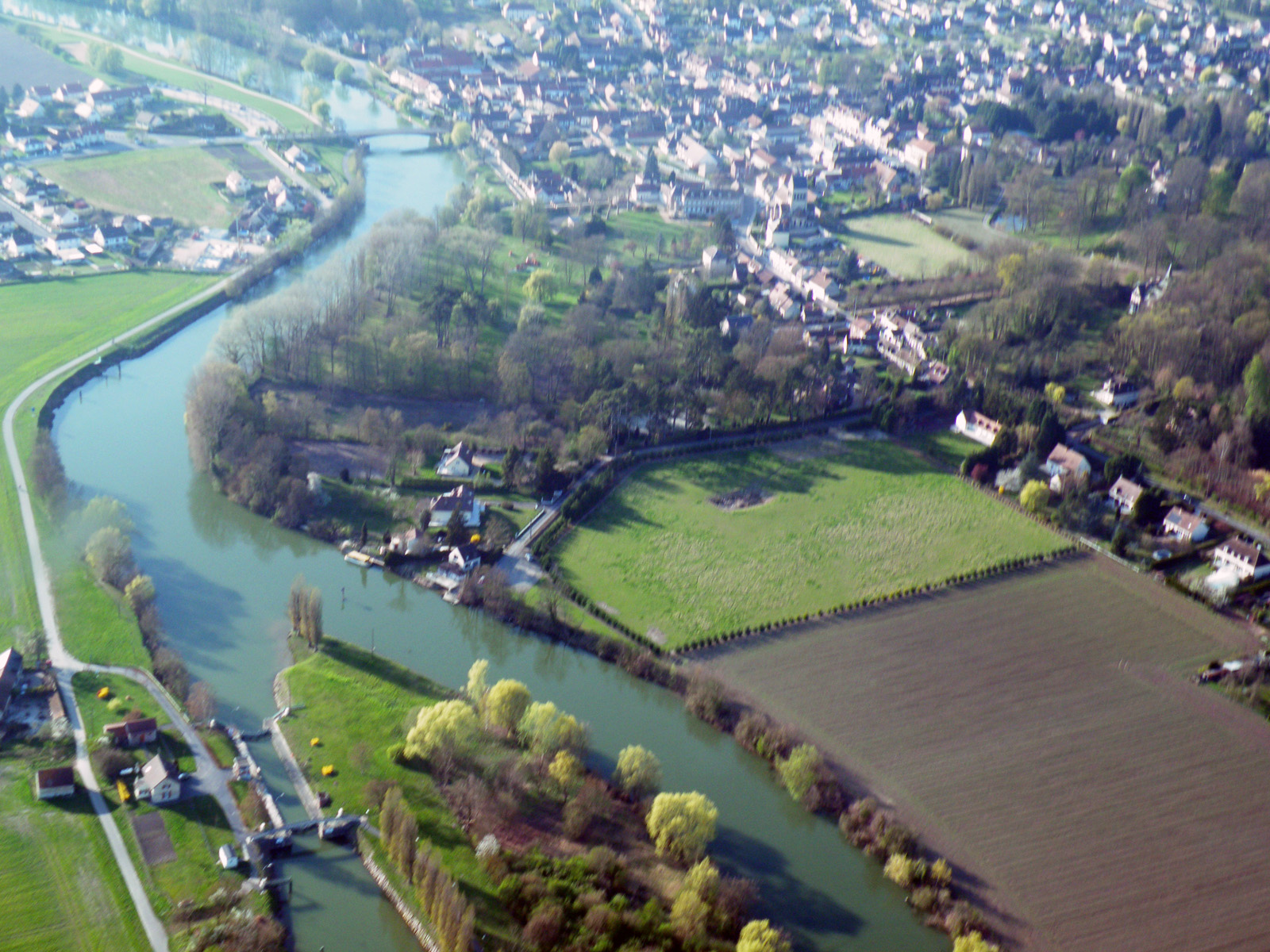 Photo aérienne, vue de l'église, de la mairie et de l'Aisne ainsi que d'une partie de la ville.